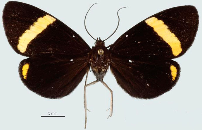 Polyptychia hermieri